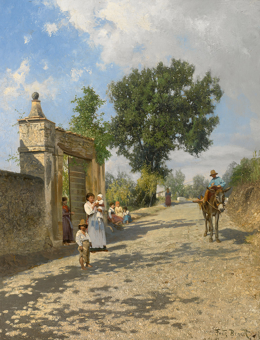 Straße in der Campagna mit steinernem Portal und Figurenstaffage